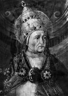 Pope Felix I. (269 - 274), Fresco in Sistine Chapel, Vatican